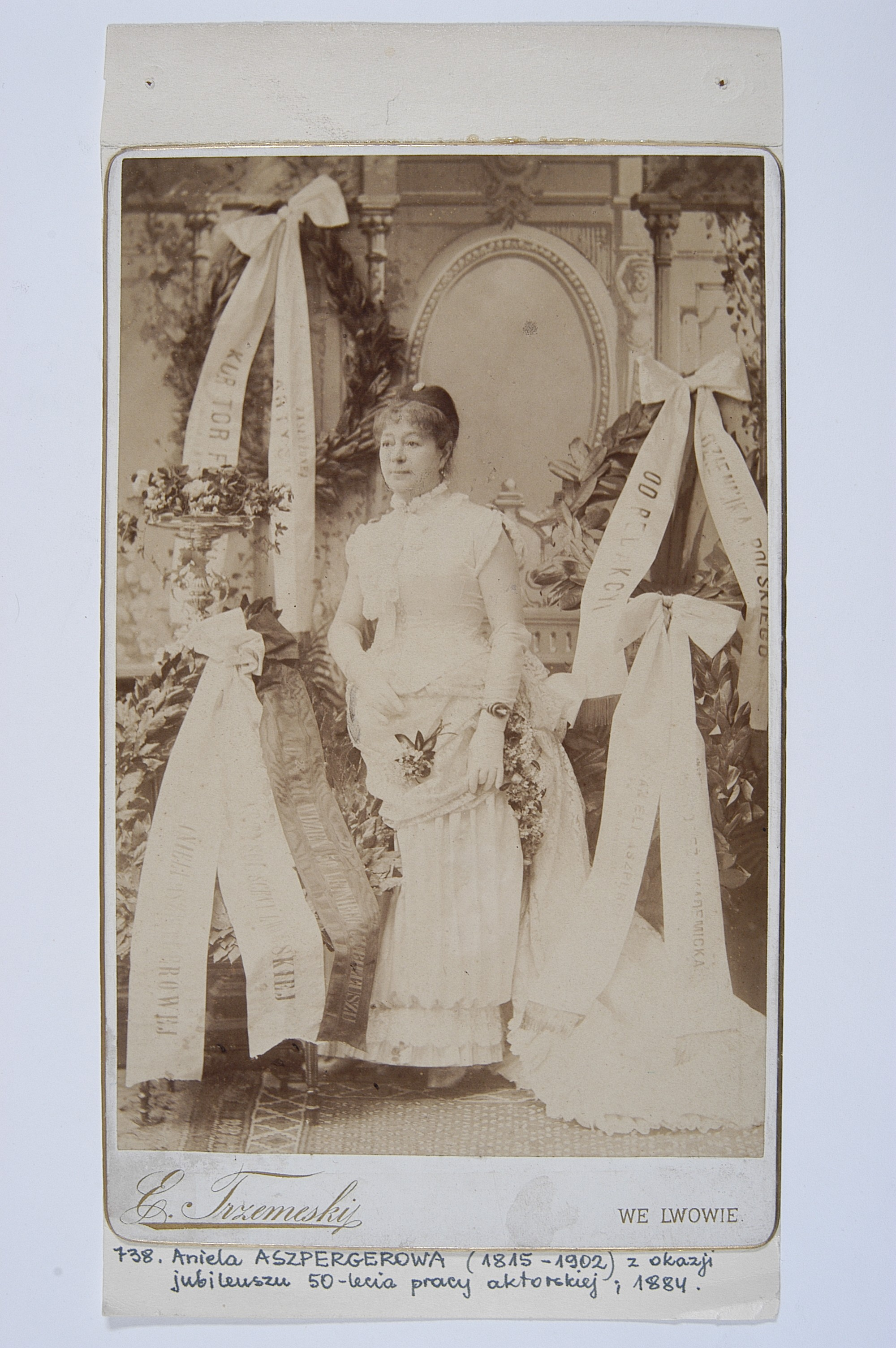 Aniela Aszperger, 1884 r.